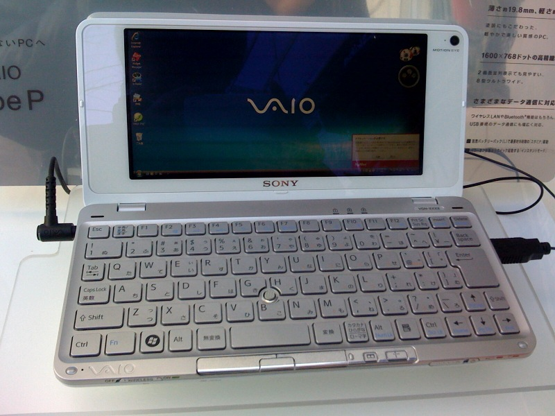 Sony VAIO PVAIO type P